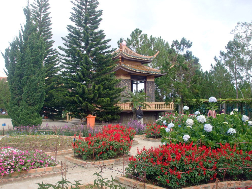 Gác trống trong khuôn viên thiền viện Trúc Lâm ở Đà Lạt (Lâm Đồng, Việt Nam).